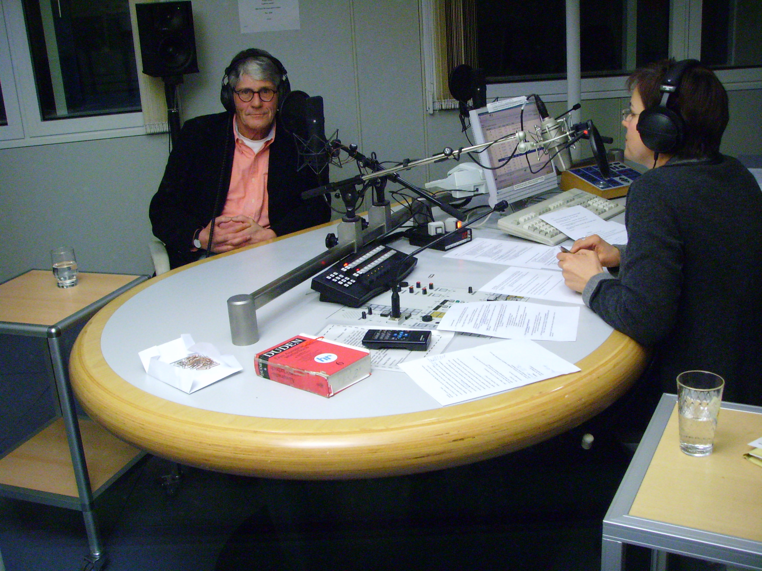 Rupert von Plottnitz, ehemaliger hessischer Justizminister hr2-Studio, mit Moderatorin Karen Fuhrmann Frankfurt am Main, 17. Februar 2006 eigene Aufnahme